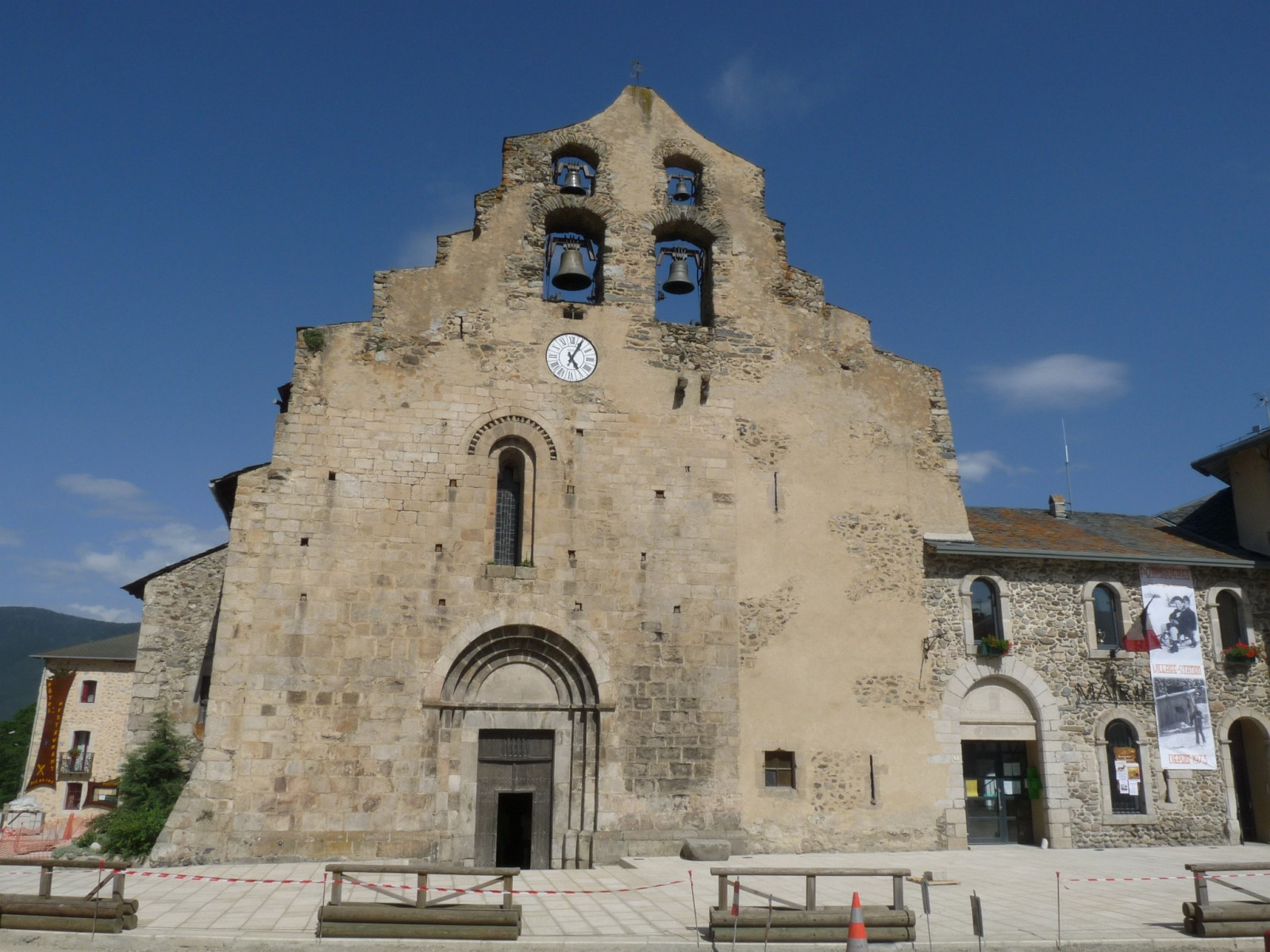 Eglise de Formiguères, Pyrénées-Orientales, France